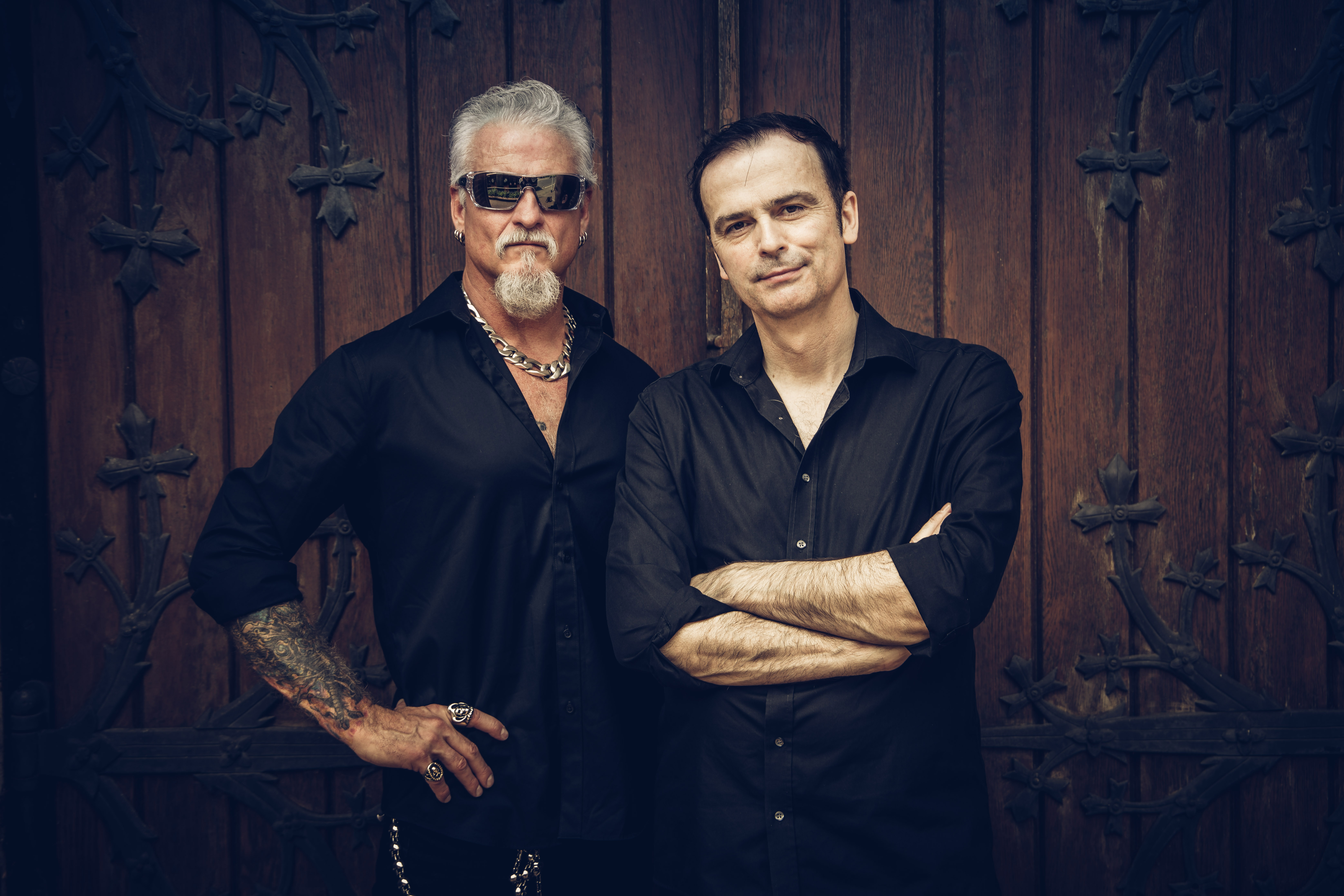 Photography by Dirk Behlau. Official Promo All rights reserved. Copyright 2019